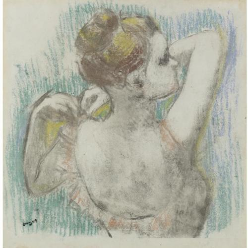 Dançarina, Busto